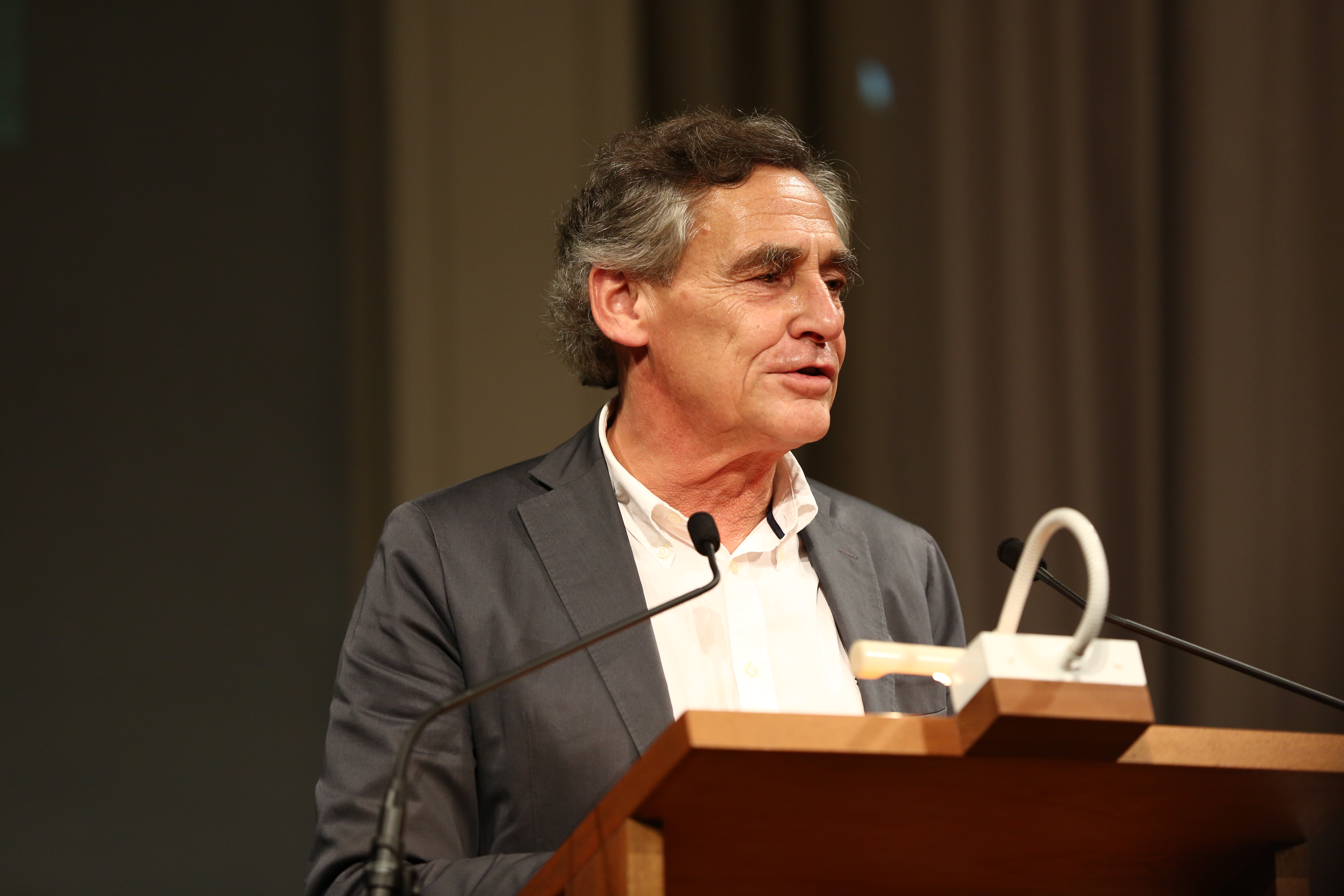 Bernd Saxe, Bürgermeister der Hansestadt Lübeck Verleihung des Thomas-Mann-Preis_2017 der Hansestadt Lübeck und der Bayerischen Akademie der Schönen Künste an Brigitte Kronauer. 18. Oktober 2017 in der Münchner Residenz.